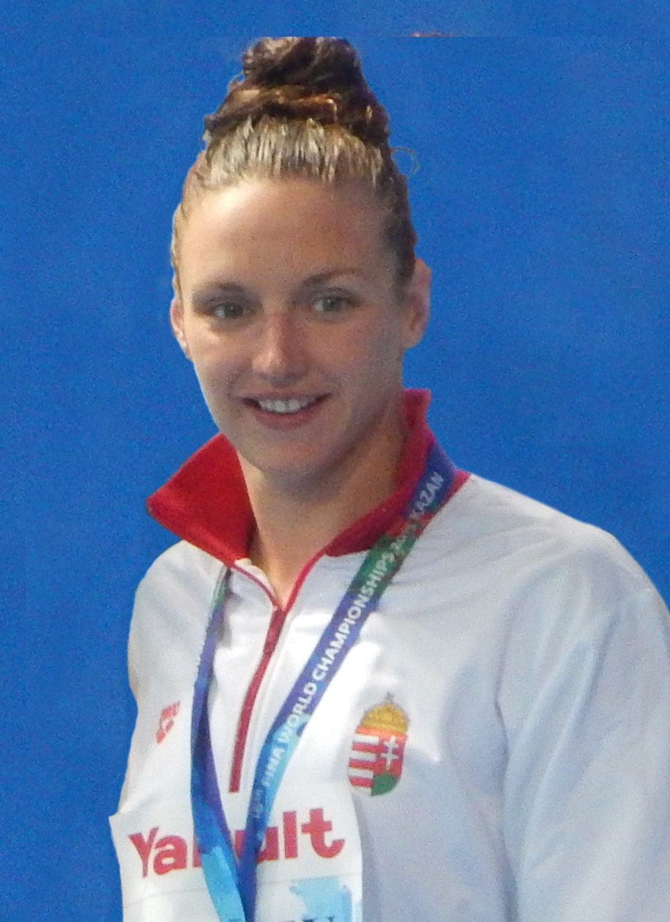 Katinka Hosszú (2015)